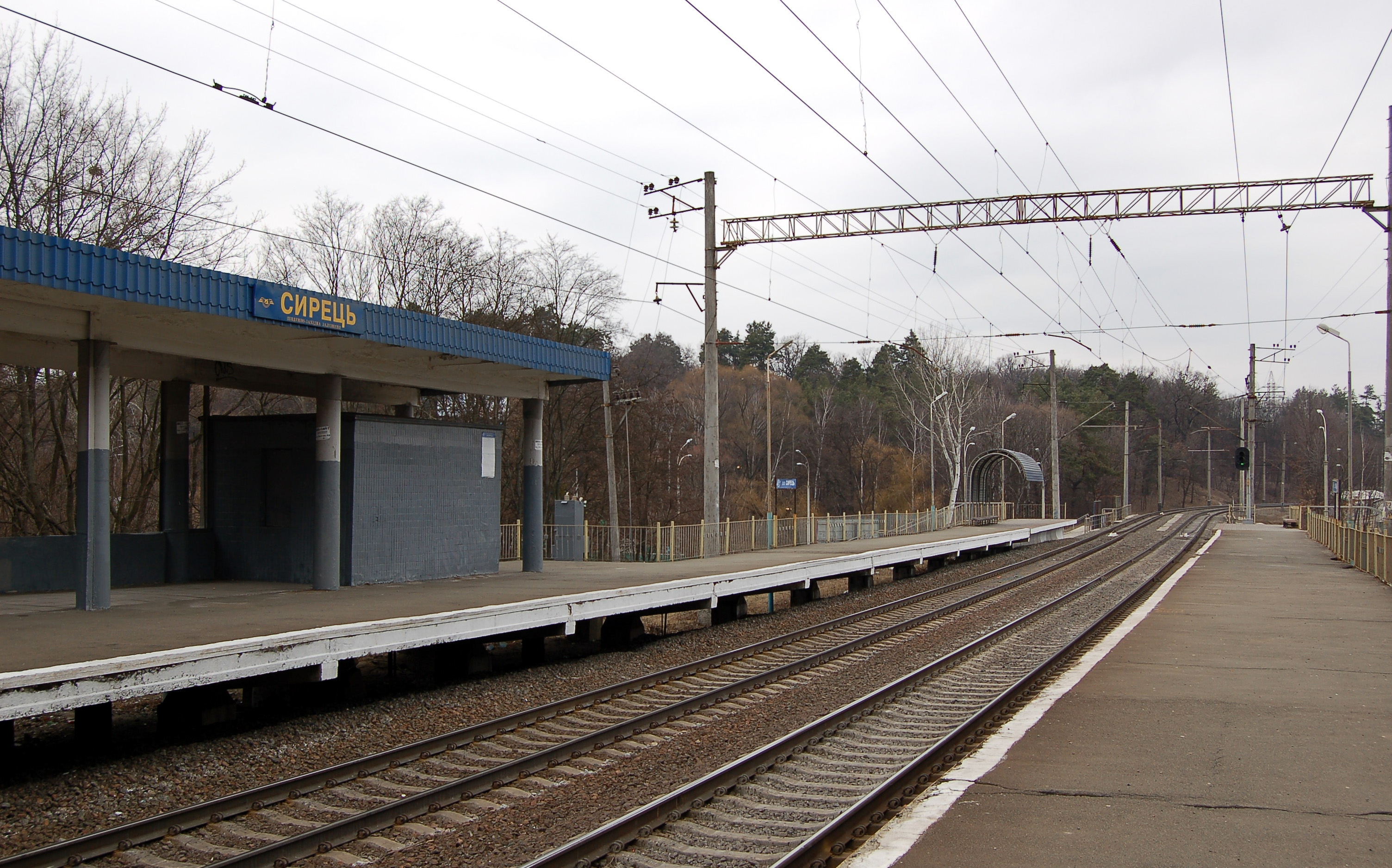 Платформа Сирець в Києві